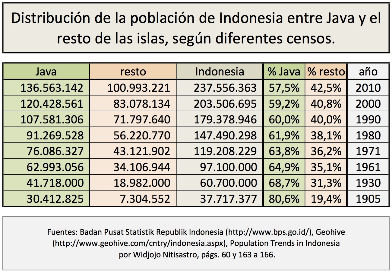 Reparto de la población de Indonesia entre Java y el resto de las islas, basada en diferentes censos.